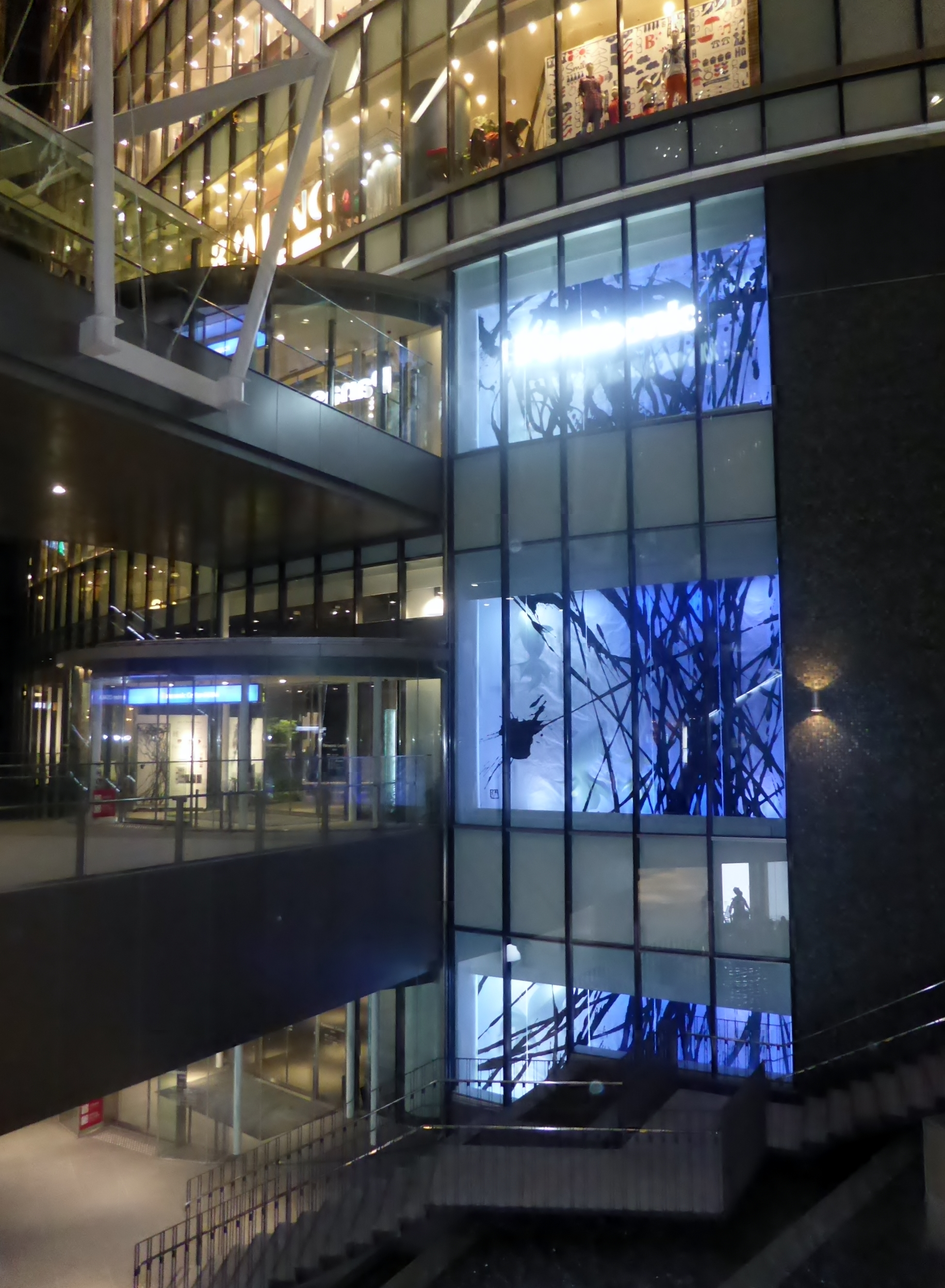 外から見たパナソニックセンター大阪を撮影。